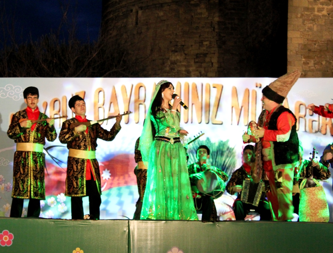 Празднование Новруз байрам в Баку